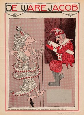 De Ware Jacob, 1908. "De Indische tot de Hollandsche kunst: Ga maar door koopman, niks noodig!"